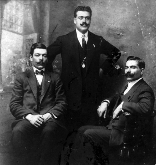 Vicenzo, Francesco y Giovanni di Domenico Mazzoli